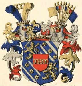 Budbergi ja Bönningshausen gen. Budbergi suguvõsa vabahärravapp